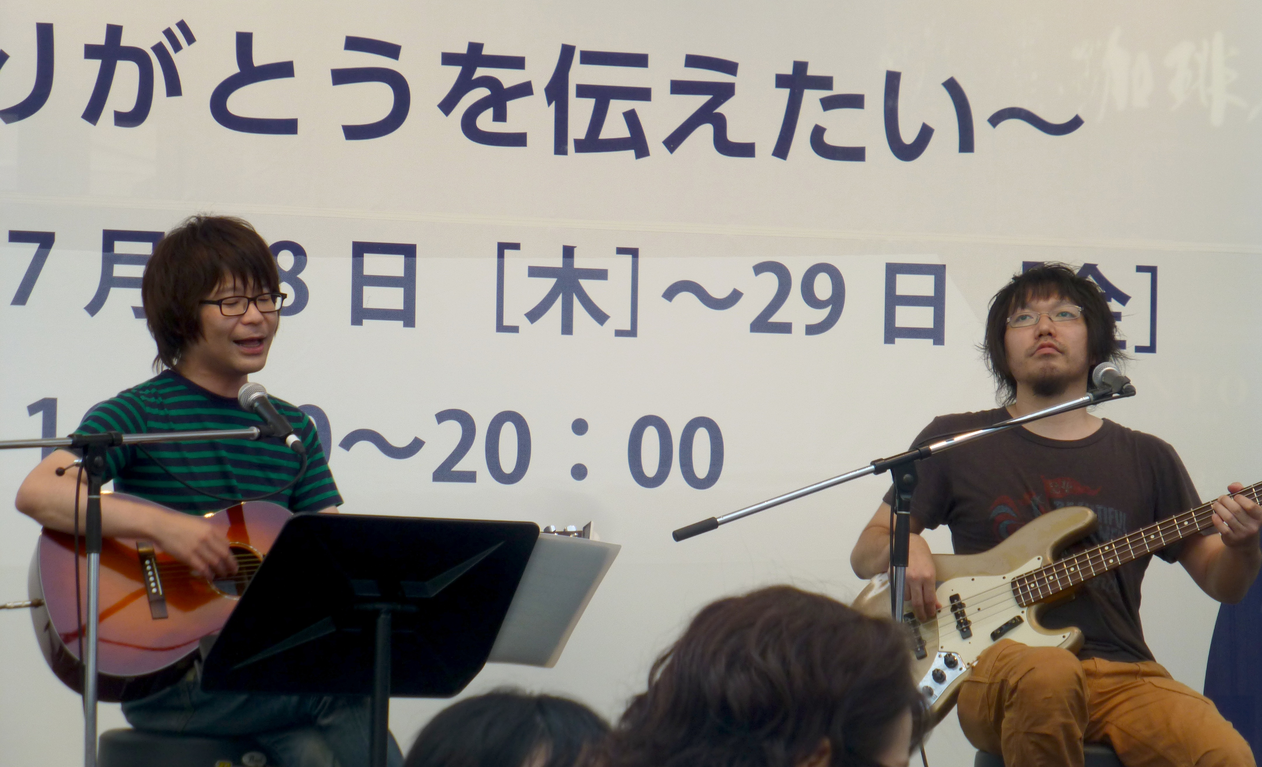 音速ライン（おんそくライン）は、日本のロックバンド。(onso9line, Japanese rock band)